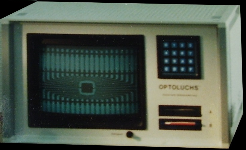 Bild vom ersten Optoluchs-System